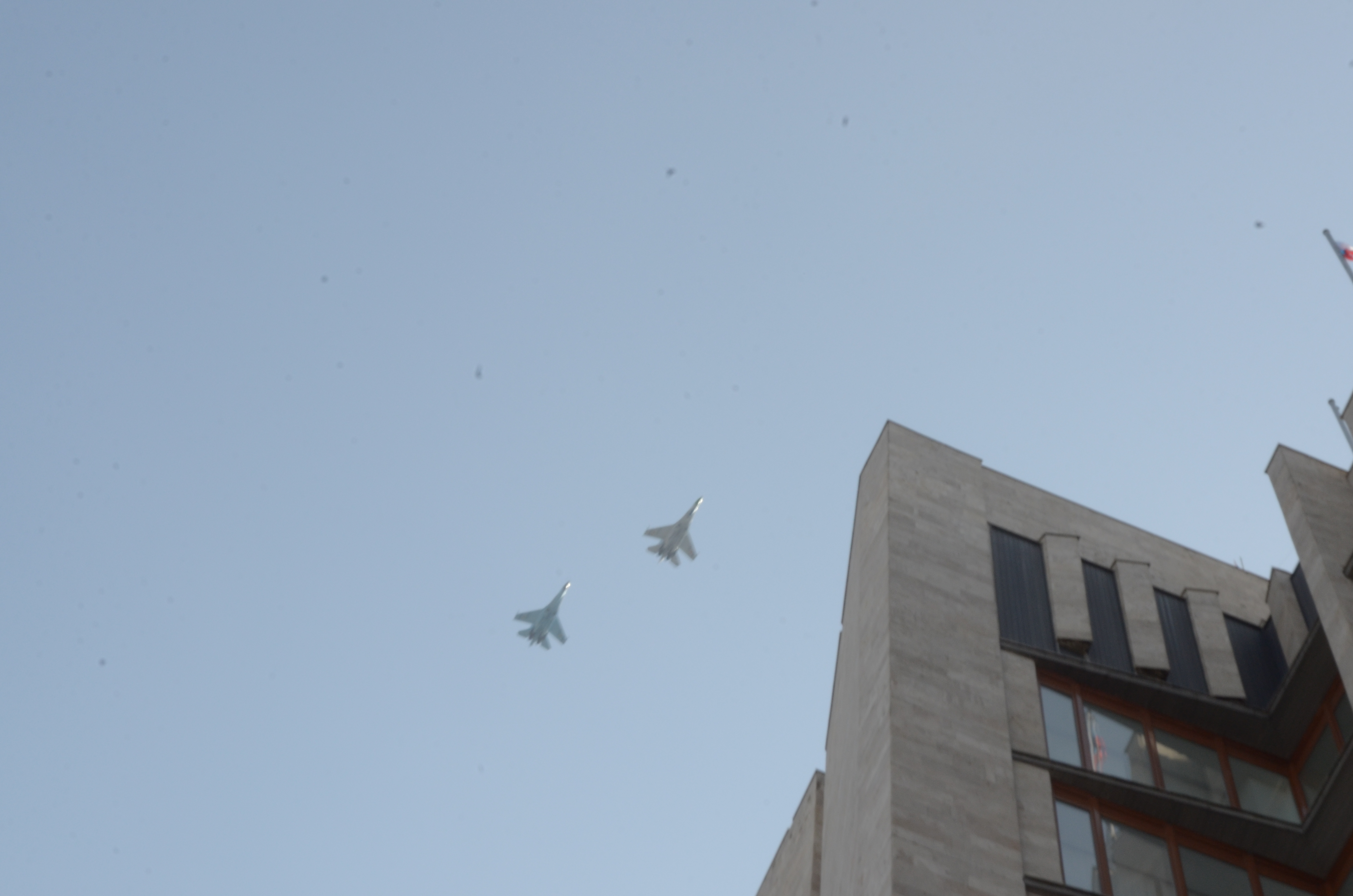 Протесты в Донецке